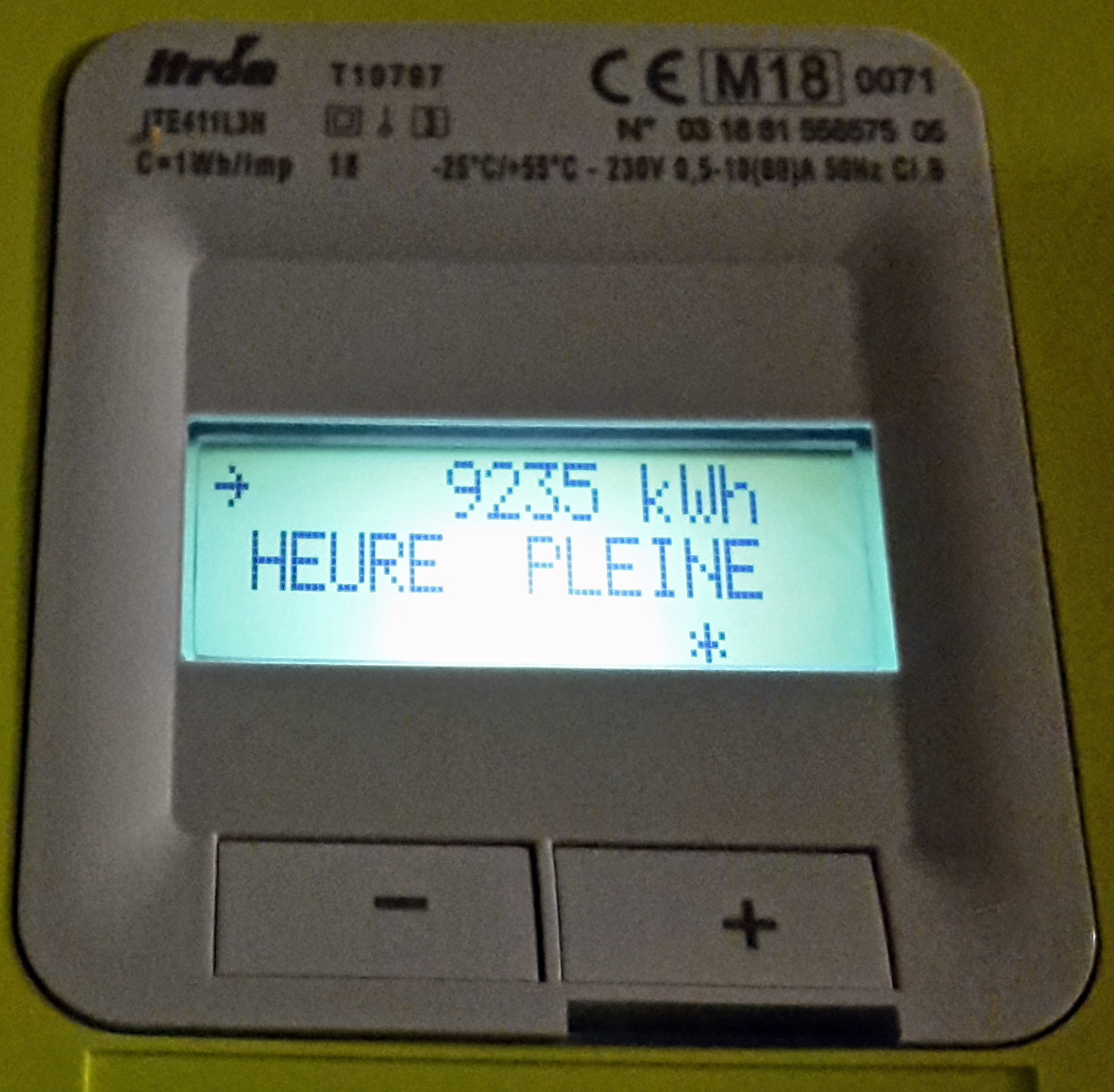 Affichage compteur Linky montrant l'énergie consommée en kWh